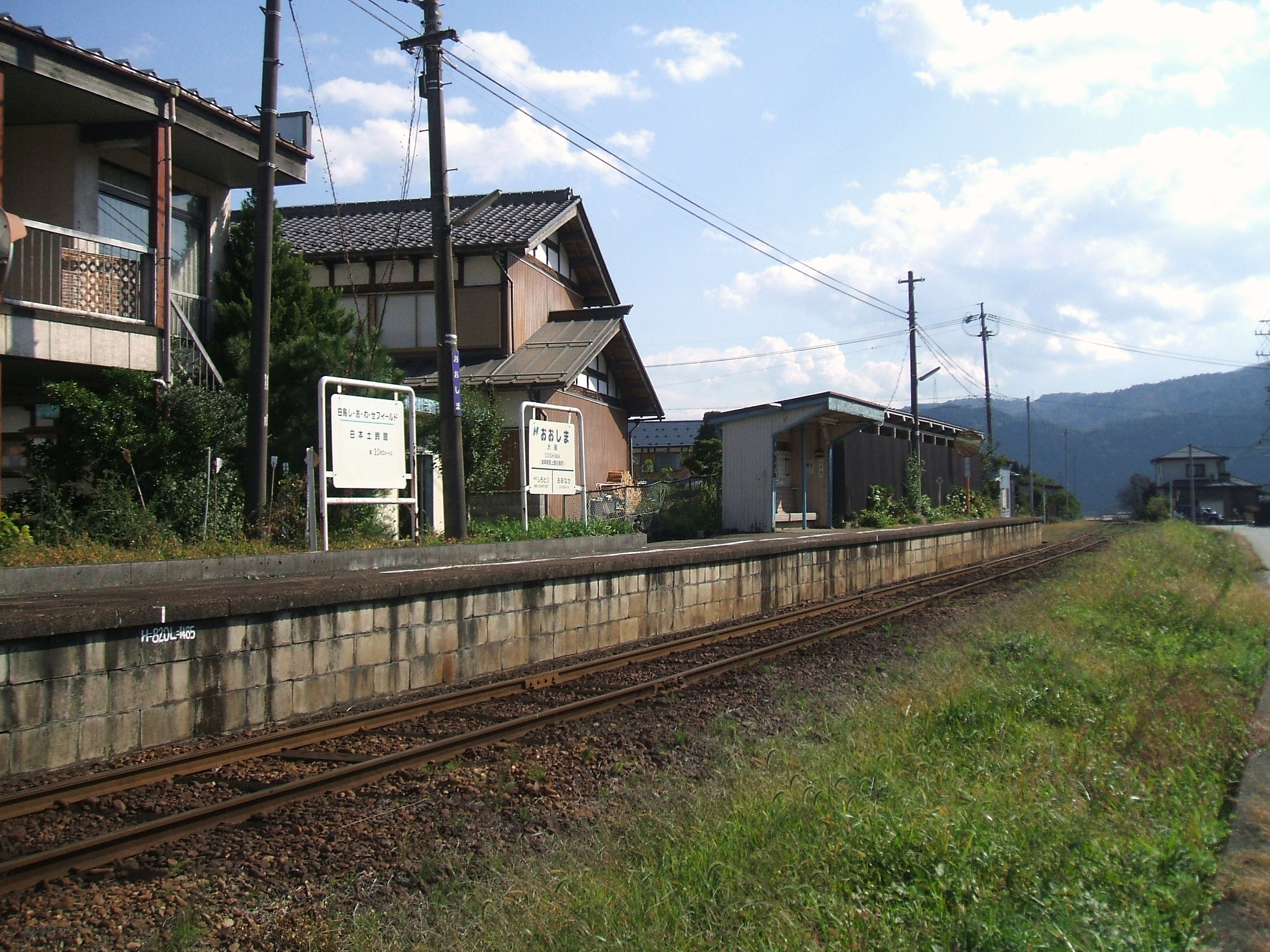 大島駅